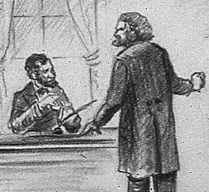 Lincoln e Frederick Douglass em desenho de Charles Henry Alston para o Office for Emergency Management. Office of War Information. Domestic Operations Branch. News Bureau.